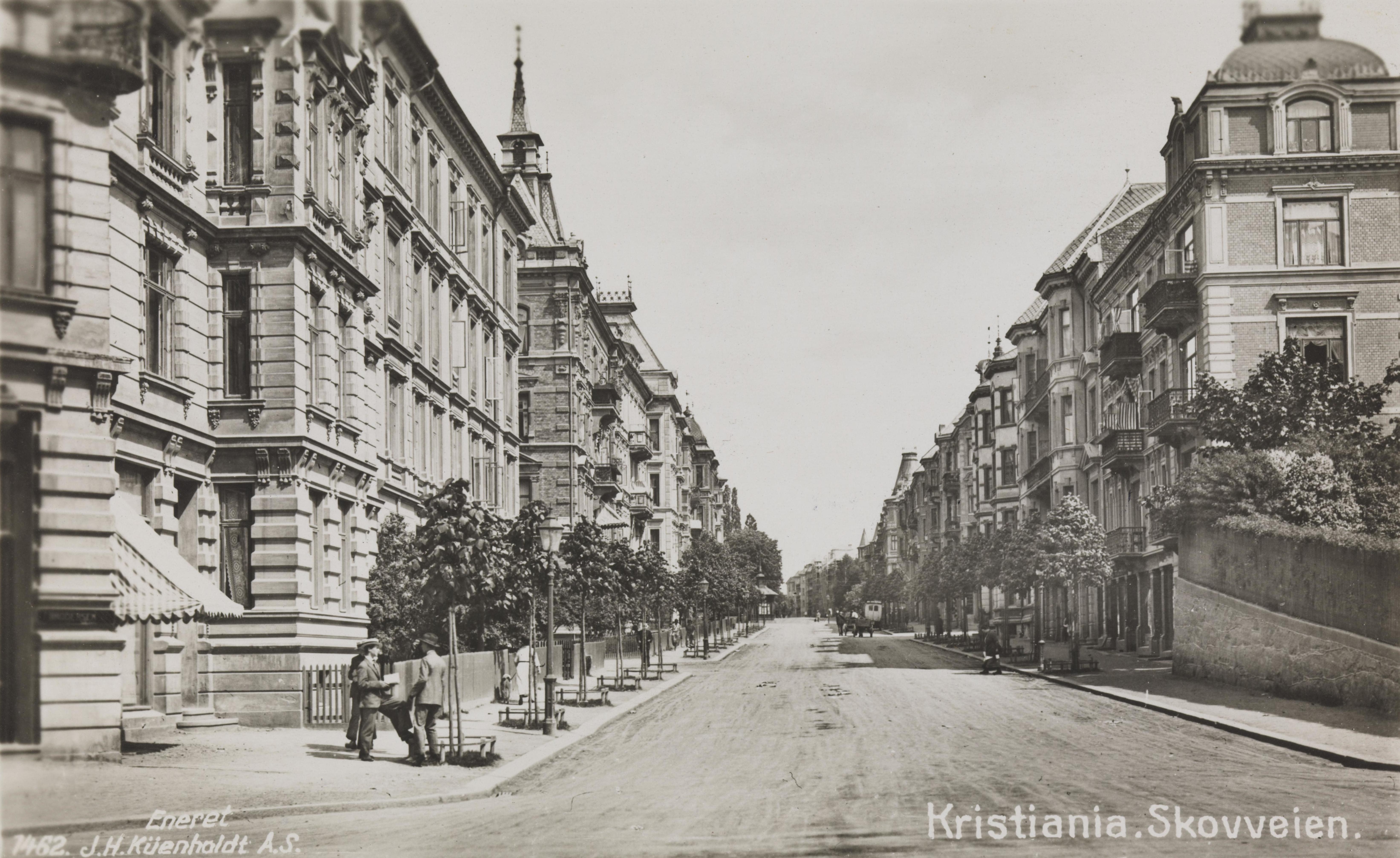 Bildet er hentet fra Nasjonalbibliotekets bildesamling Frogner, Skovveien, Oslo. Bildet er tatt nordøstover fra Colbjørnsens gate. Fra venstre ser vi nr. 16, 18, 20 osv. Nr. 20 har et hjørnetårn med spir som siden er praktisk talt fjernet, muligens i forbindelse med utbygging av loftesetasje.